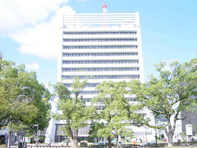 Wakayama City Hall（和歌山市役所）